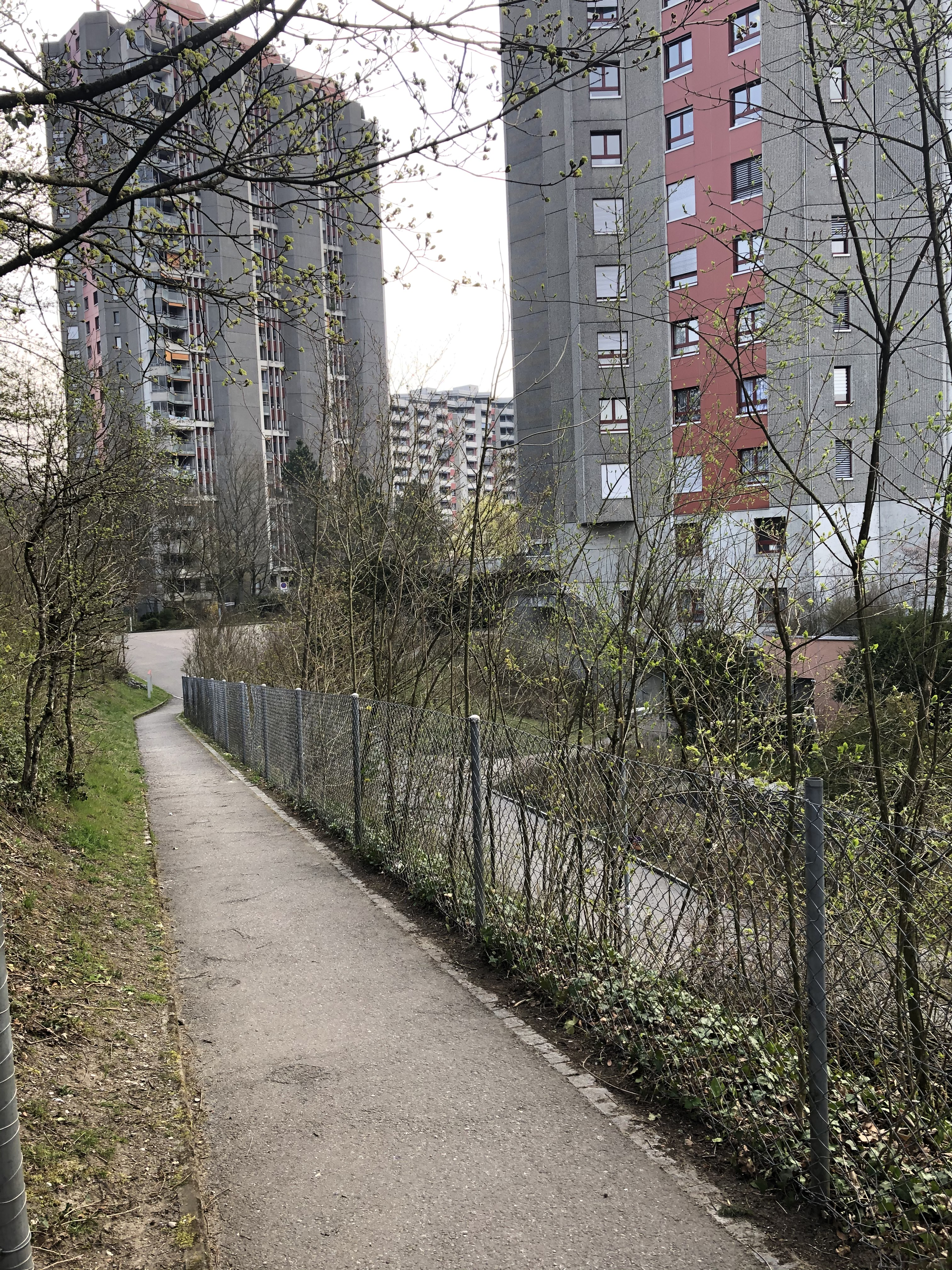 Holenacker Hochhausblick vom Nordwesten